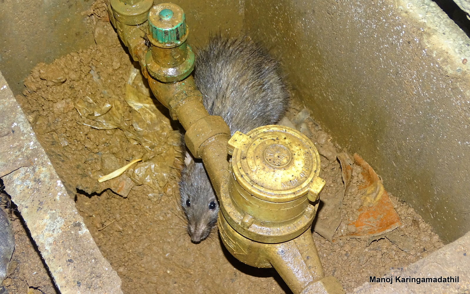 പെരുച്ചാഴി